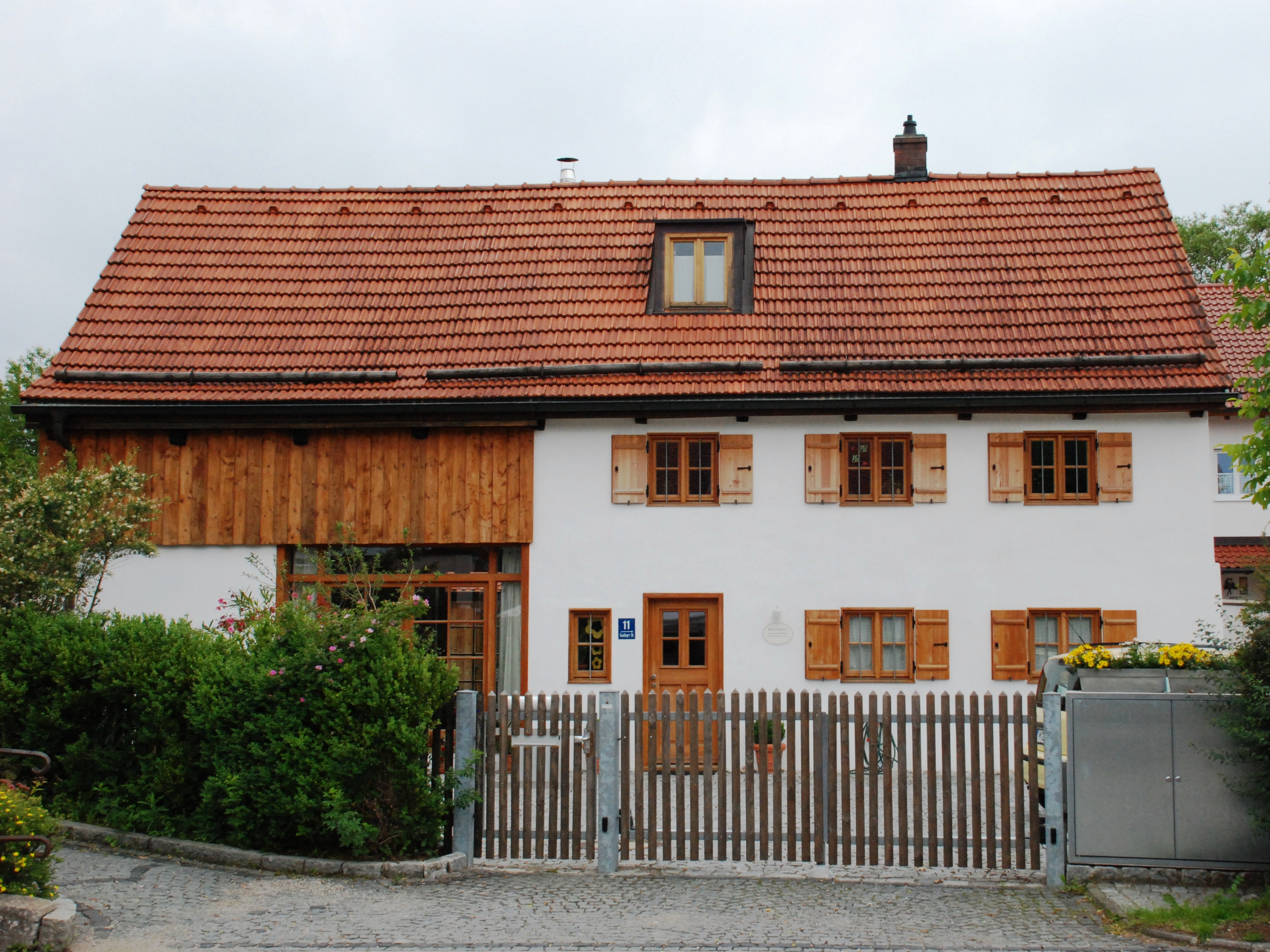 Ehemaliges Bauernhaus und Mesneranwesen, Hausname „Beim Hausch“, in der Gautinger Straße 11 in der Gemeinde Neuried, Landkreis München, Bezirk Oberbayern, Bayern. Erbaut 1655 mit starken Veränderungen im 19. Jahrhundert. Als Baudenkmal unter Aktennummer D-1-84-132-3 in der Bayerischen Denkmalliste aufgeführt.